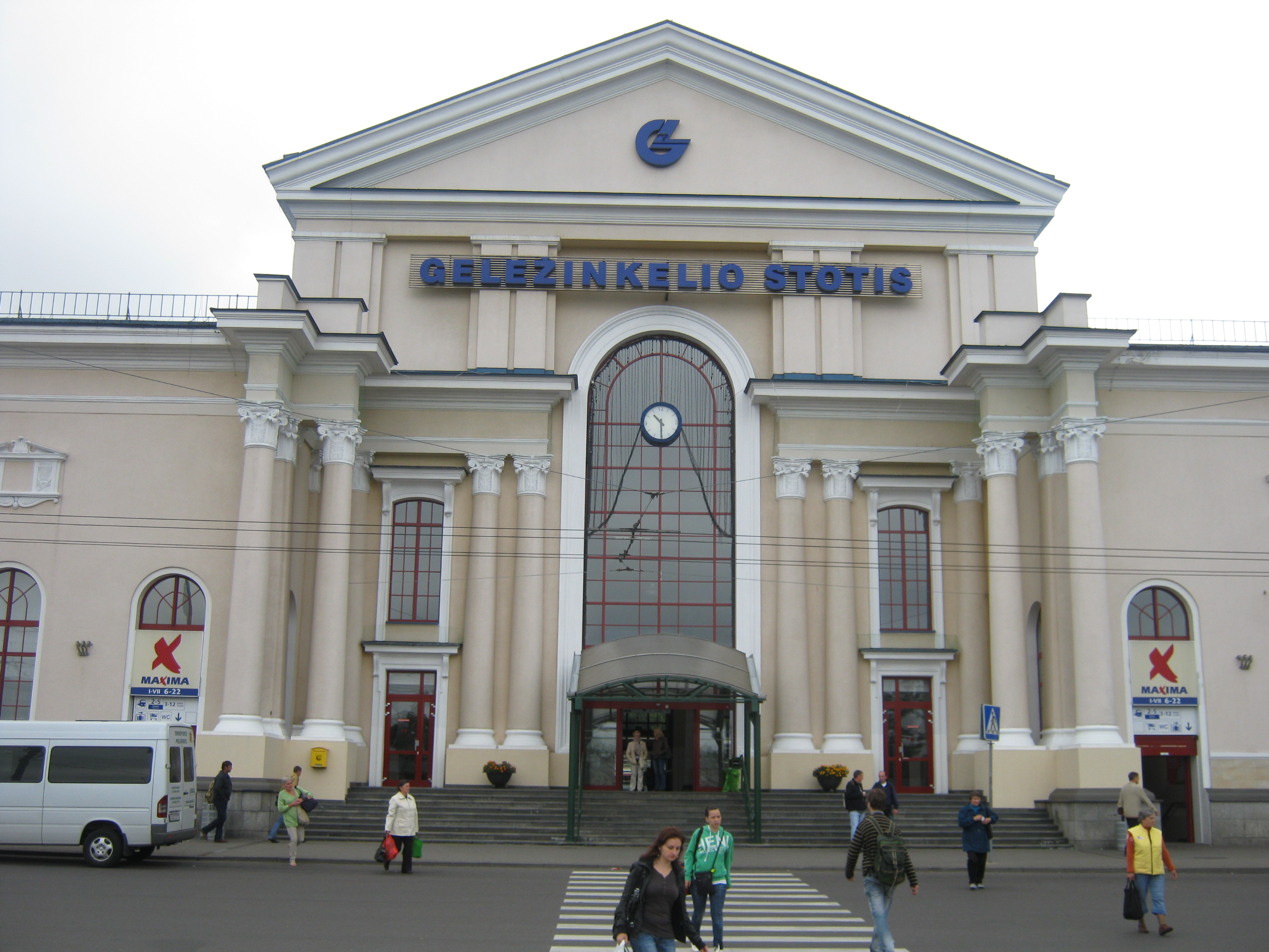 Vilniaus geležinkelio stotis